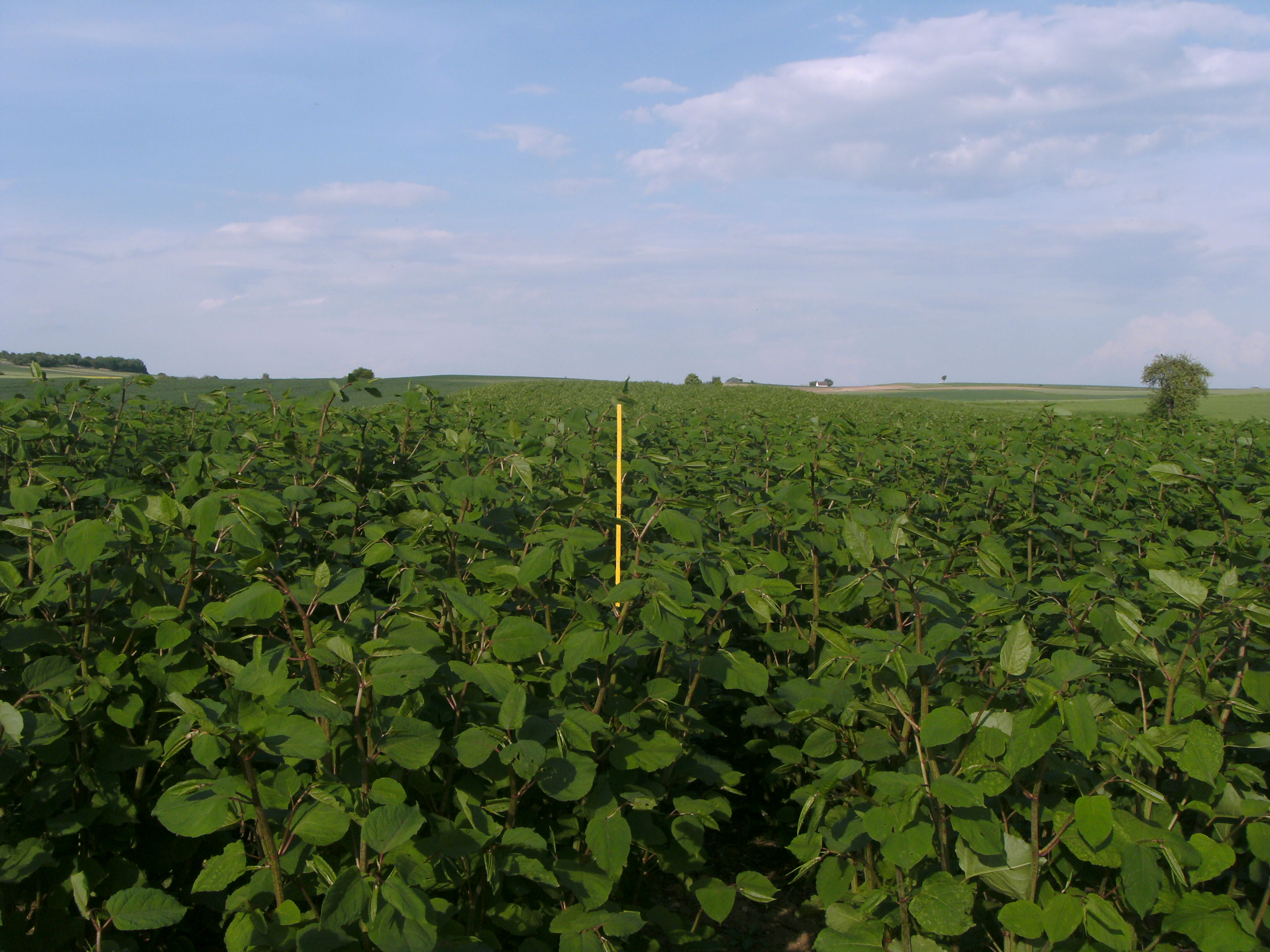 Igniscumfeld (Fallopia sp.) als landwirtschaftliche Kultur